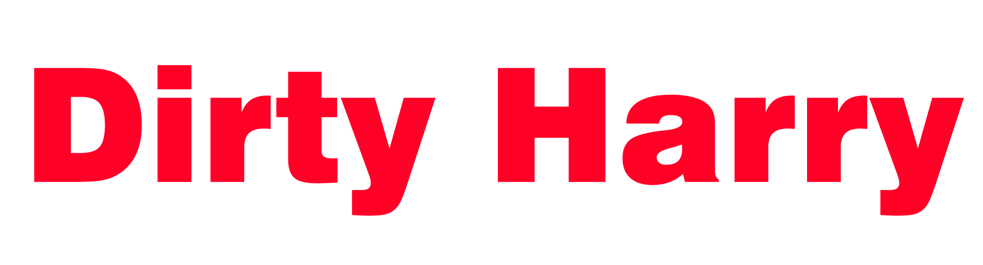 Dirty Harry German Logo